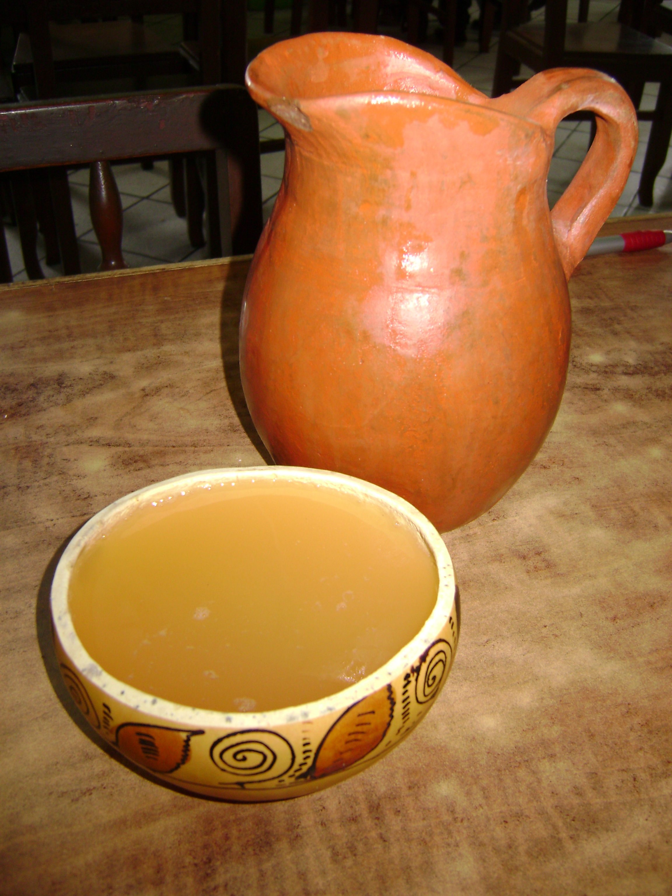 Clarito (chicha de jora de sabor suave) servido en un envase conocido como "poto". Catacaos, Piura, Perú.